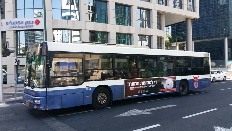 קמפיין נגד המשלוחים החיים שעלה בישראל באוגוסט 2016 במימון הארגון האוסטרלי Animals Australia ובשיתוף ארגונים ישראליים למען בעלי חיים.